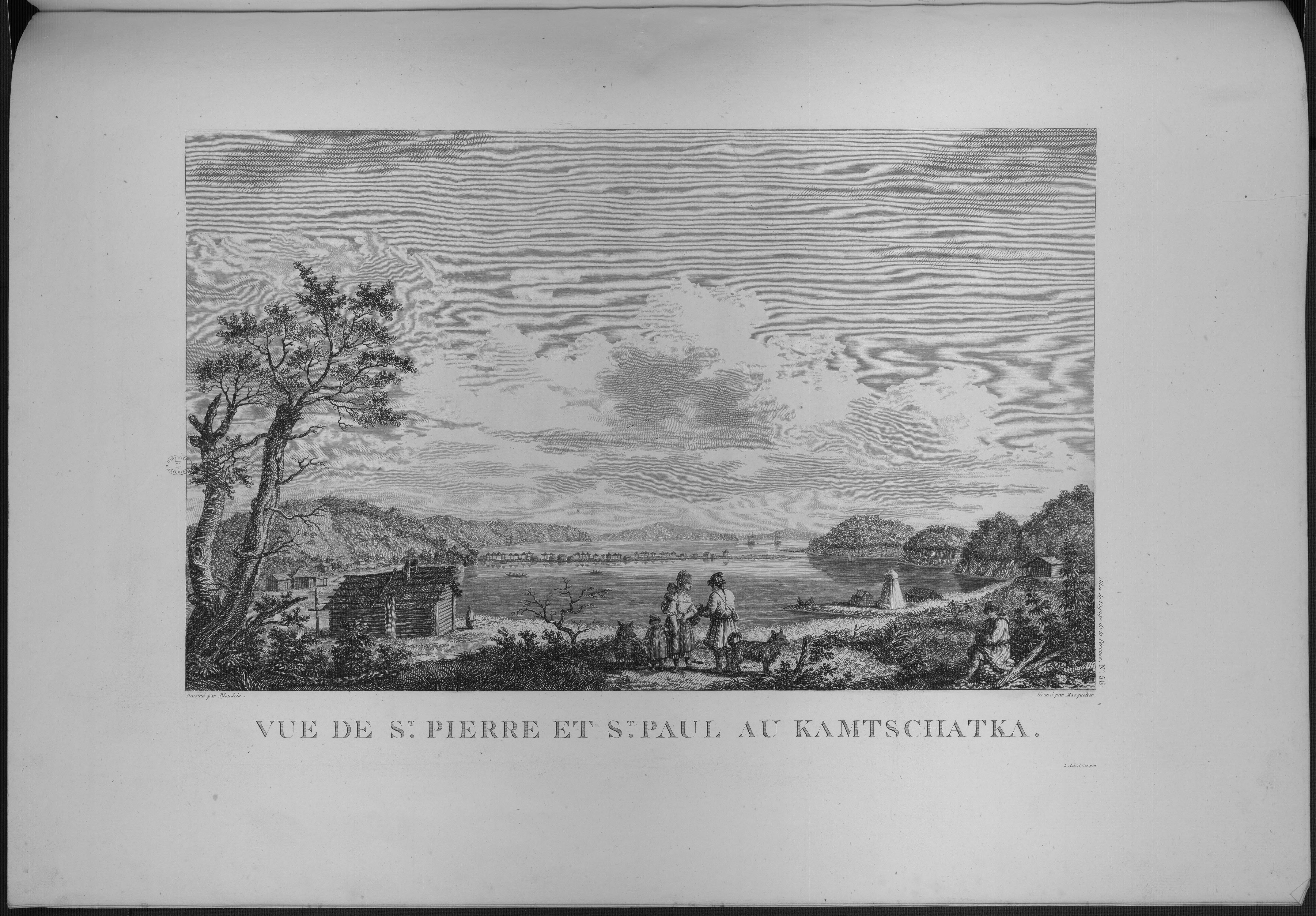 Atlas du voyage de La Pérouse